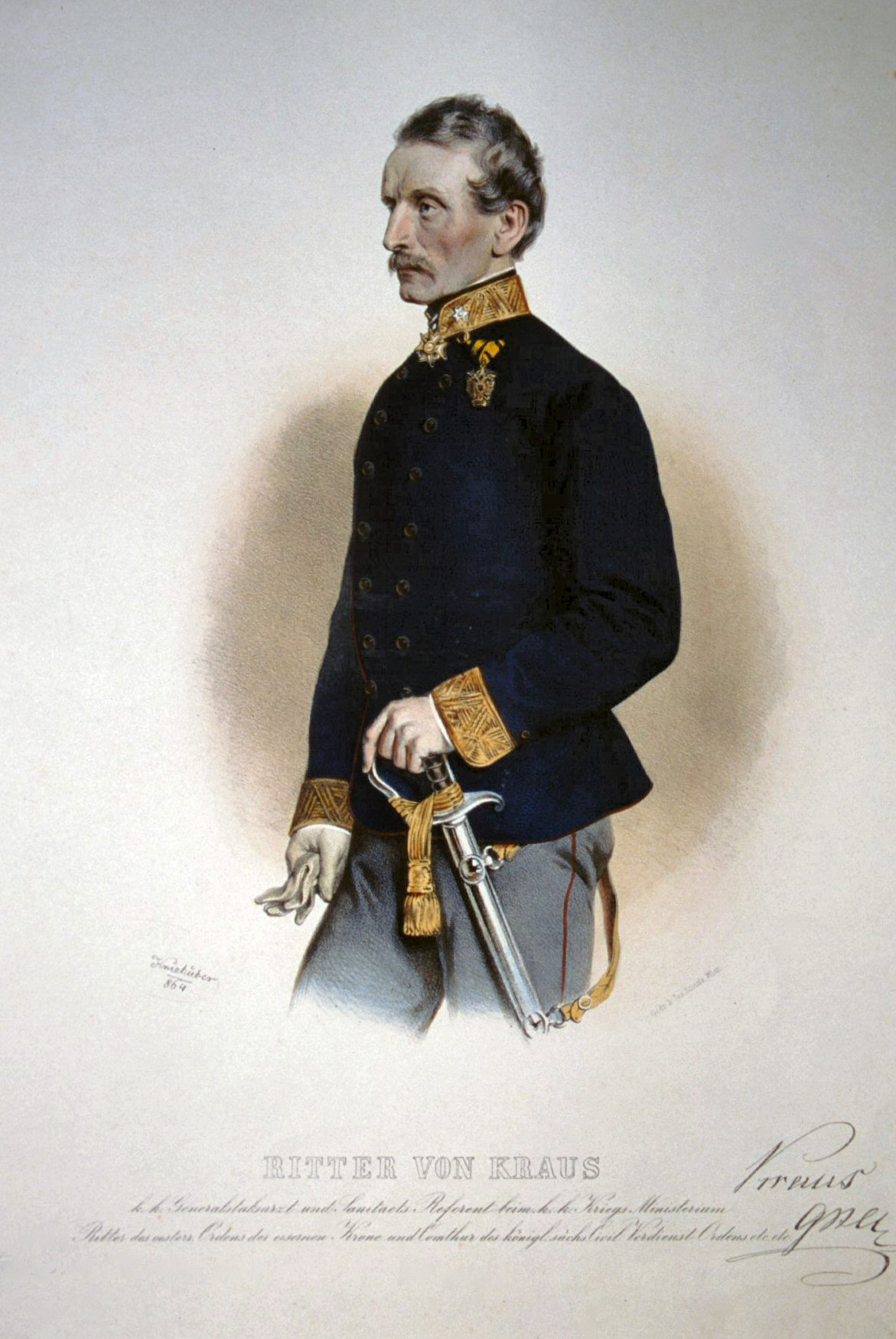 Felix Ritter von Kraus (1805-1875), k. k. Generalstabsarzt und Sanitäts-Referent beim k. k. Kriegs - Ministerium. Lithographie von Josef Kriehuber, 1864